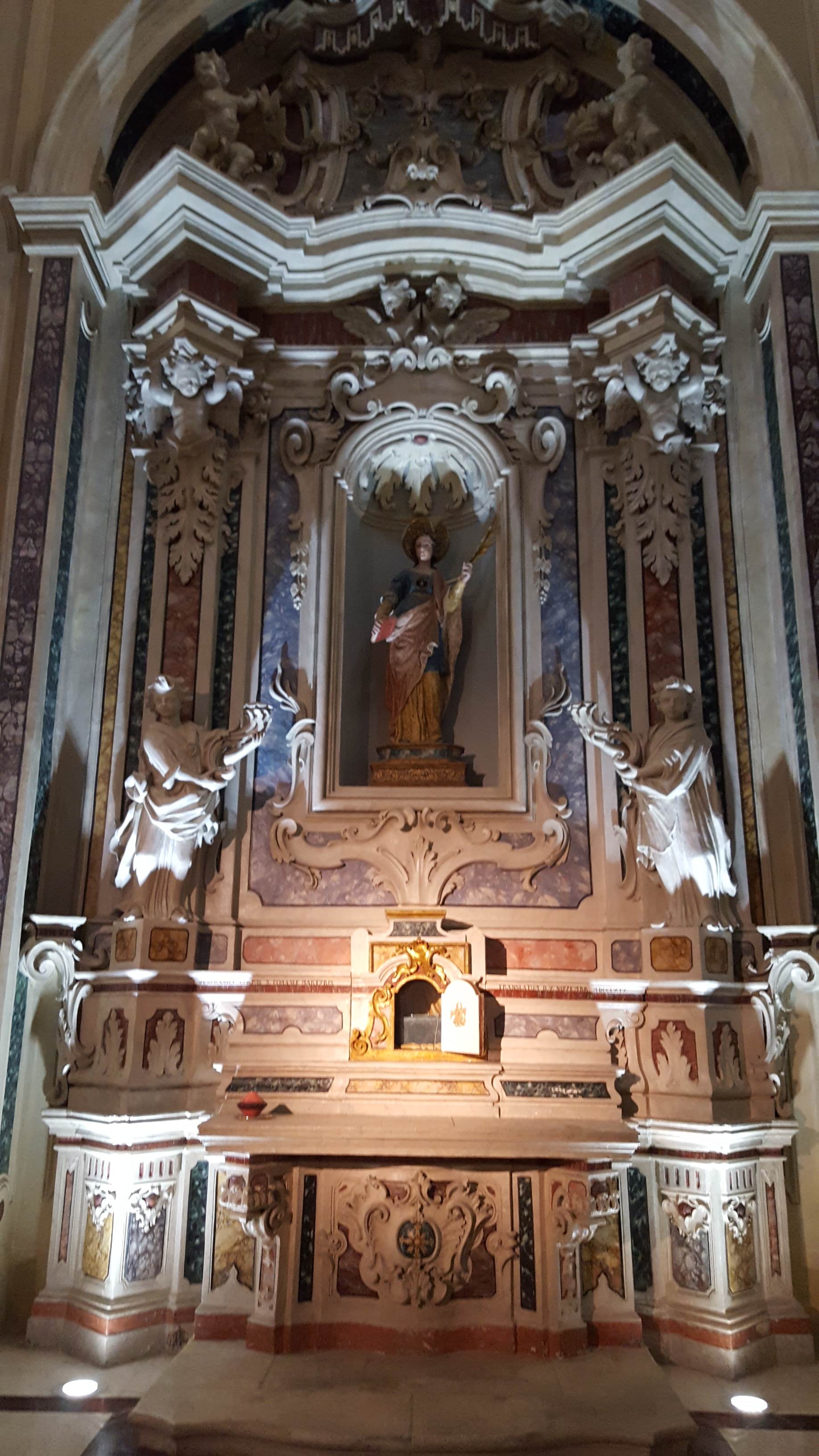 Altare di santa Comasia - San Martino, Martina franca